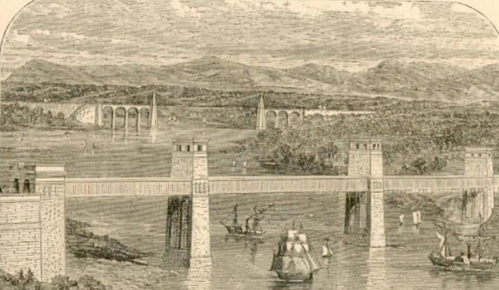 Menai bridge, vers 1850 Source : English pictures drawn with pen and pencil By the Rev. Samuel Manning, LL.D., and the Rev. S. G. Green, D.D. London, The religious tract society Vers 1850